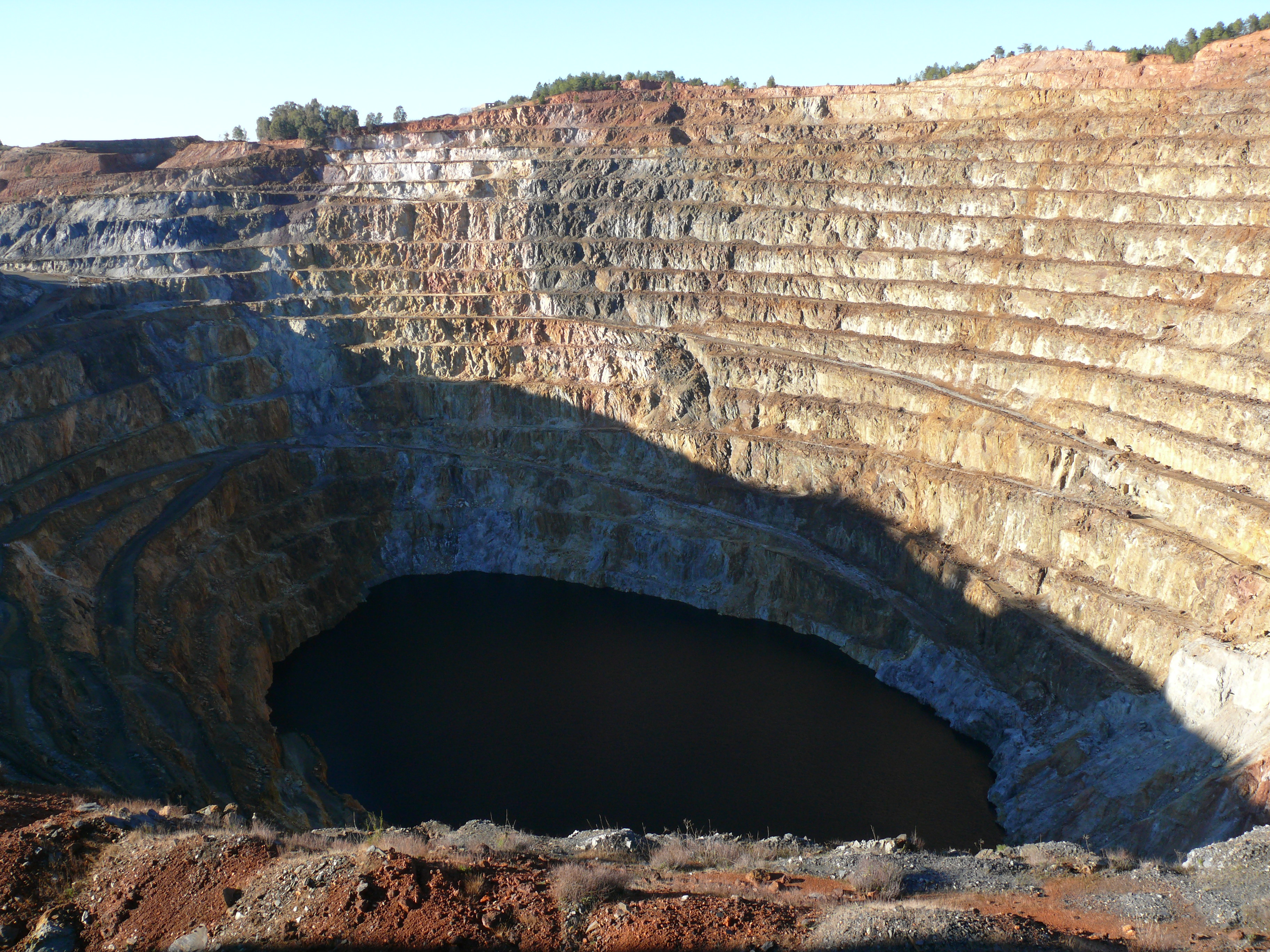 Atalaya